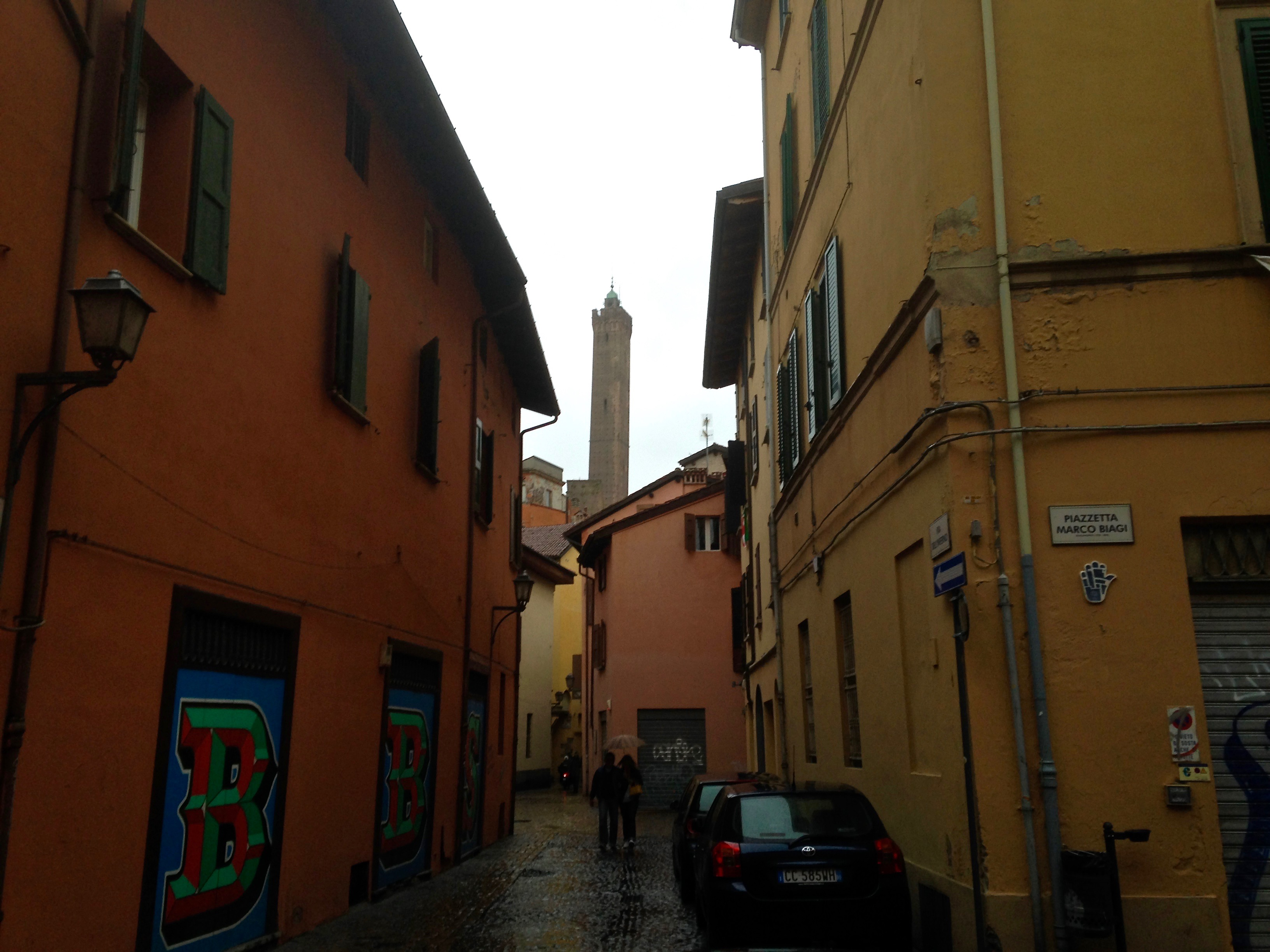 Un'immagine di Piazzetta Marco Biagi all'interno del Ghetto di Bologna